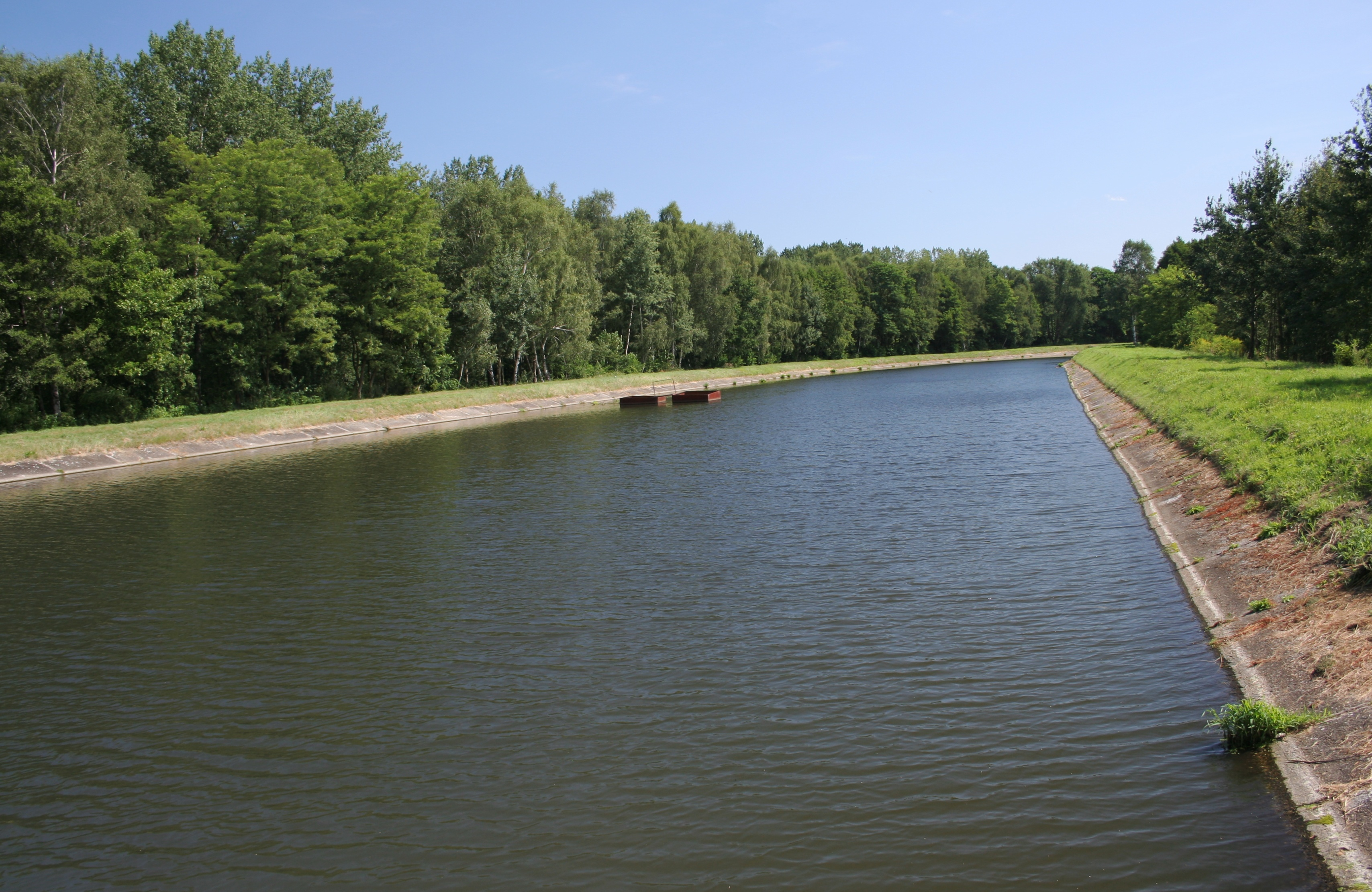 Zbiornik Orzepowicki wOrzepowicach, dzielnicy Rybniku.